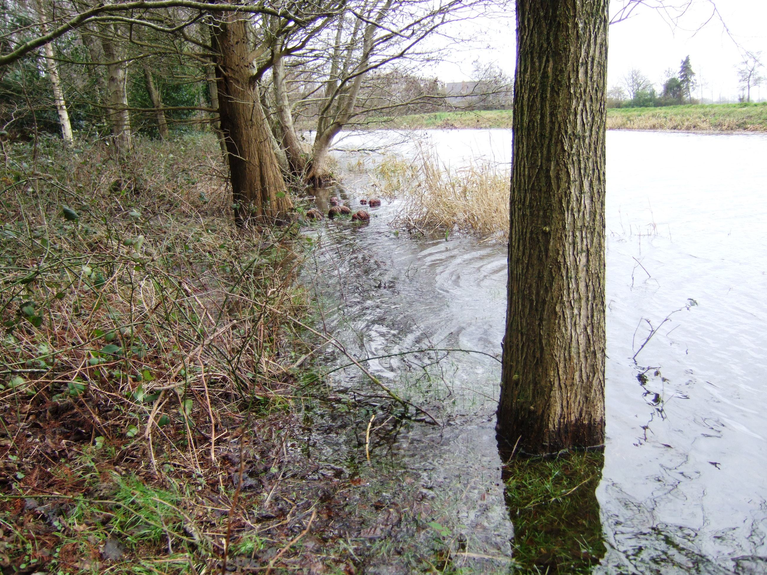 Wassend boezemwater in de Jonkersloot (gemeente Skarsterlân) als gevolg van een noordwester storm.